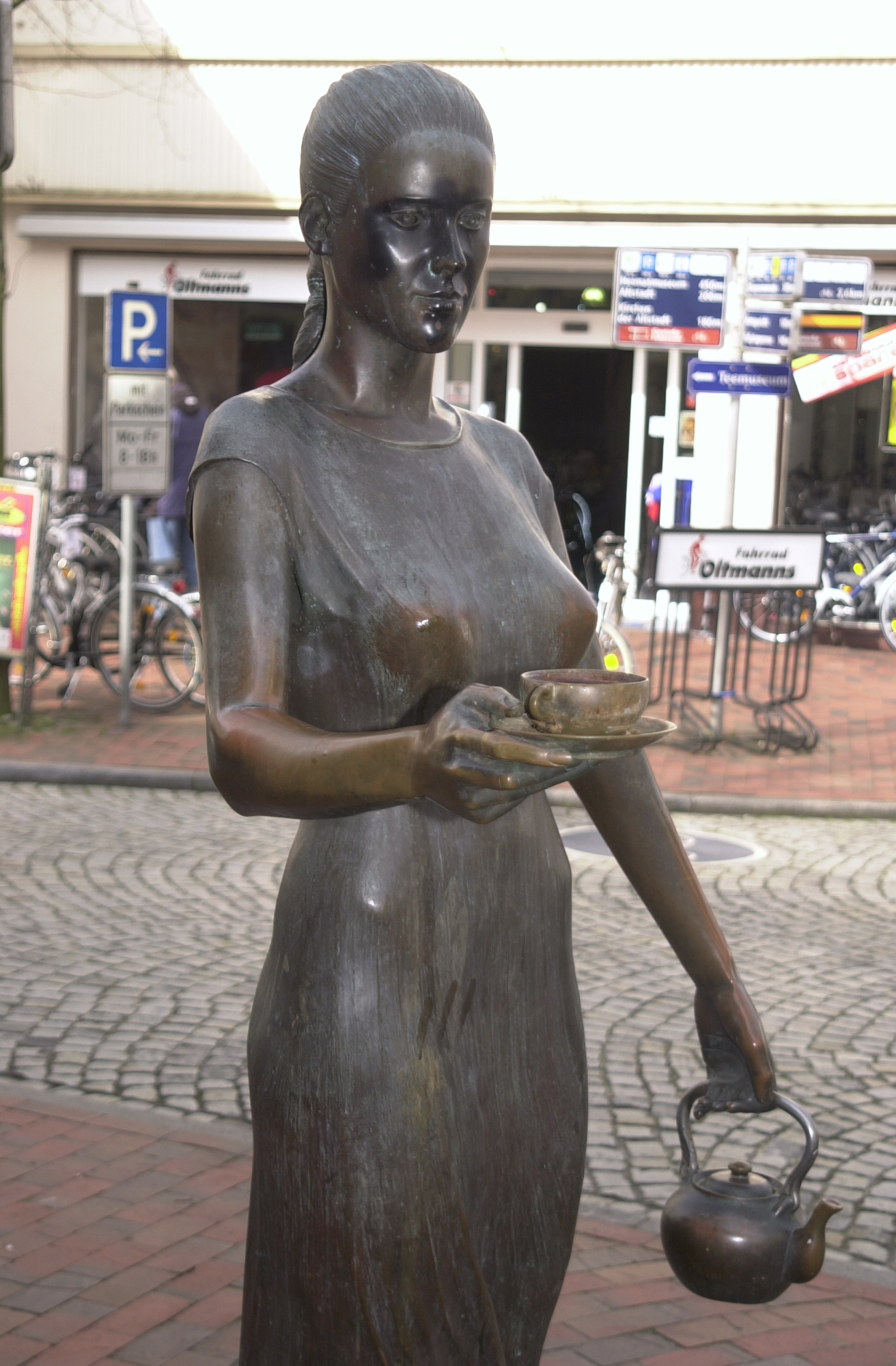 Bronzestatue "Teelke" in Leer (Ostfriesland). Das Werk des Leeraner Künstlers Karl-Ludwig Böke steht vor dem Stammhaus des traditionsreichen ostfriesischen Teehandelshauses Bünting. Die Firma hat die Statue der "Teebotschafterin" auch gestiftet und der Stadt Leer und seinen Bewohner gewidmet.